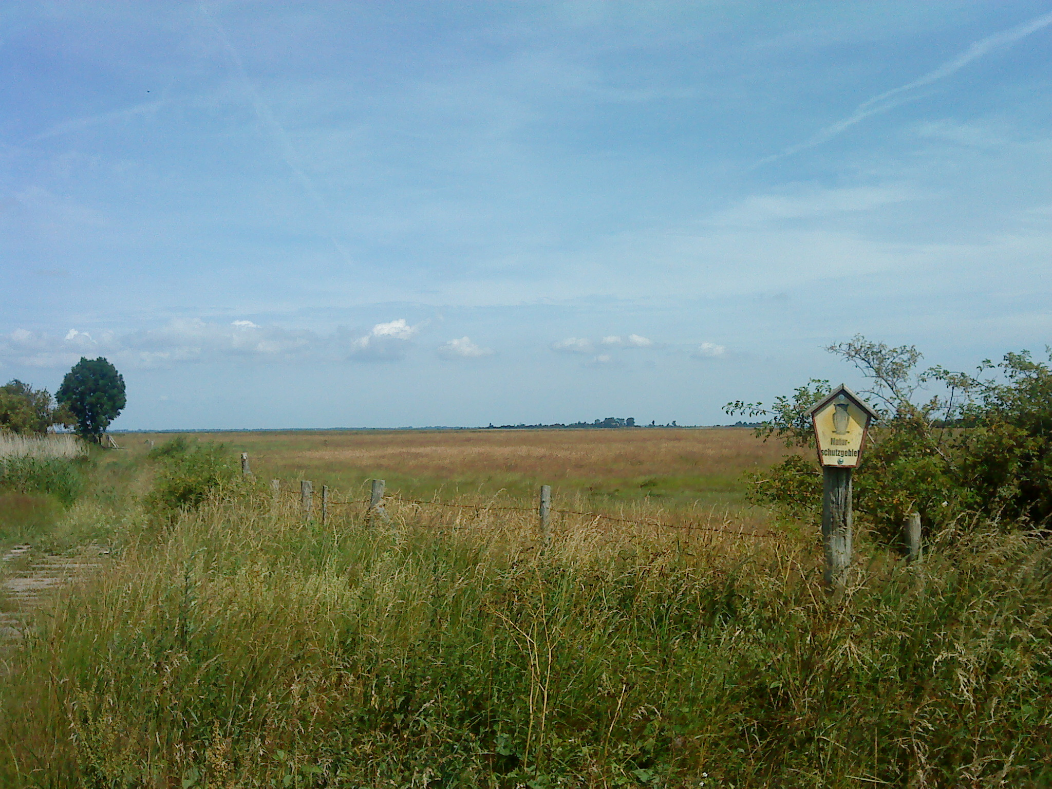 Kooser Wiesen im Naturschutzgebiet „Insel Koos, Kooser See und Wampener Riff“, Blick auf Koos (am Horizont)